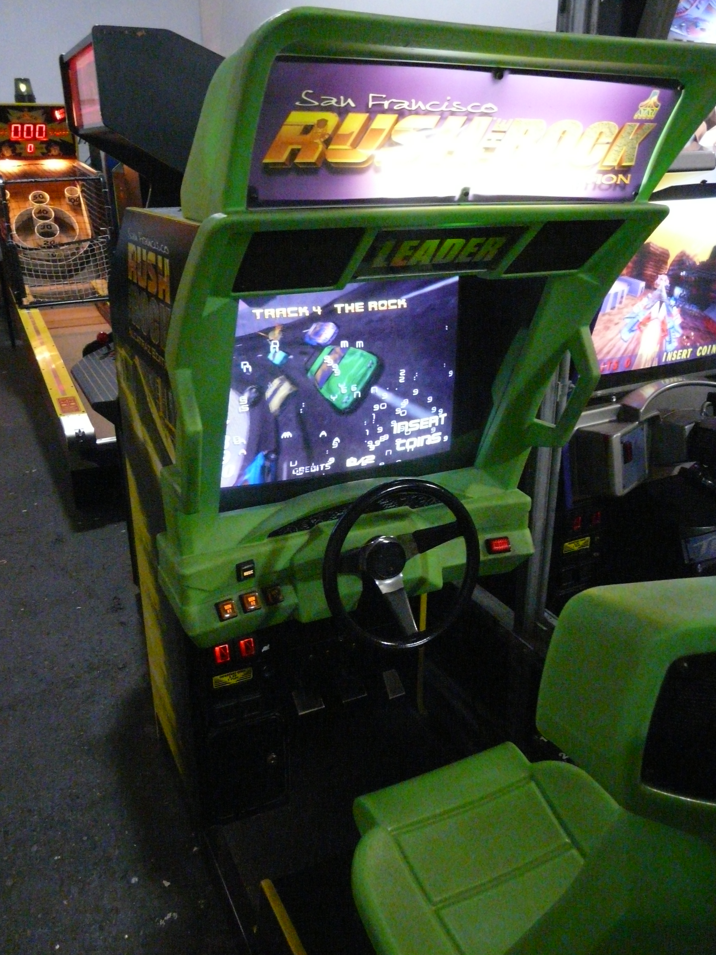 Borne d'arcade de la version San Francisco Rush The Rock: Alcatraz Edition.